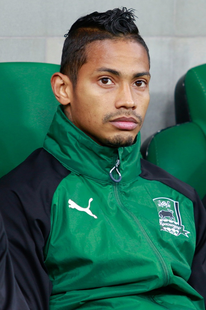 «Краснодар» - ЦСКА